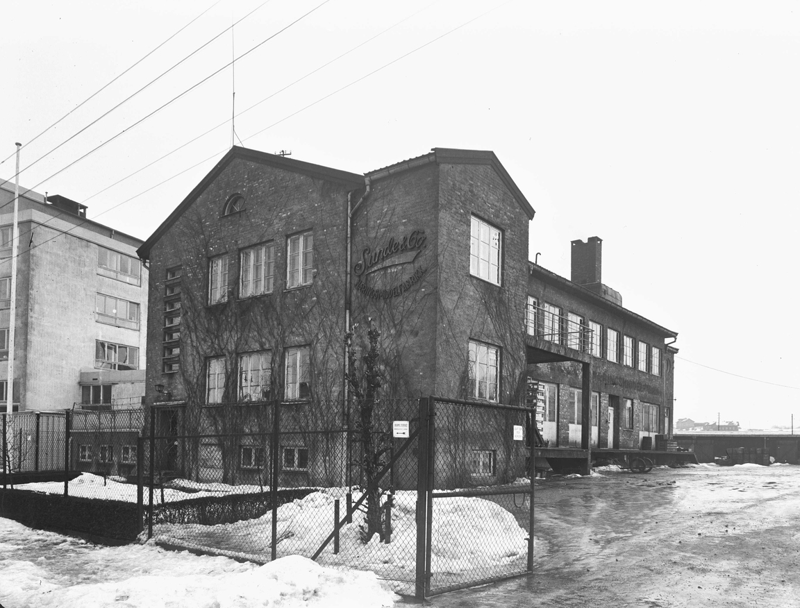 Sunde & Co Næringsmiddelfabrikk, Ensjøveien 14. Arkitekt: Hjalmar Severin Bakstad. Foto: Leif Ørnelund, 6. februar 1950. Fra Byhistorisk samling hos Oslo Museum.